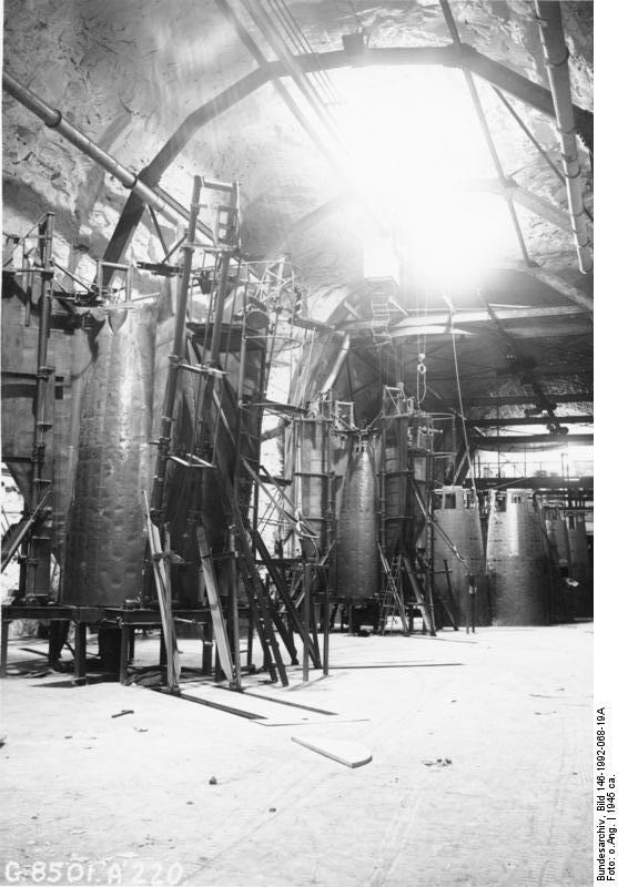 G8501 A 220